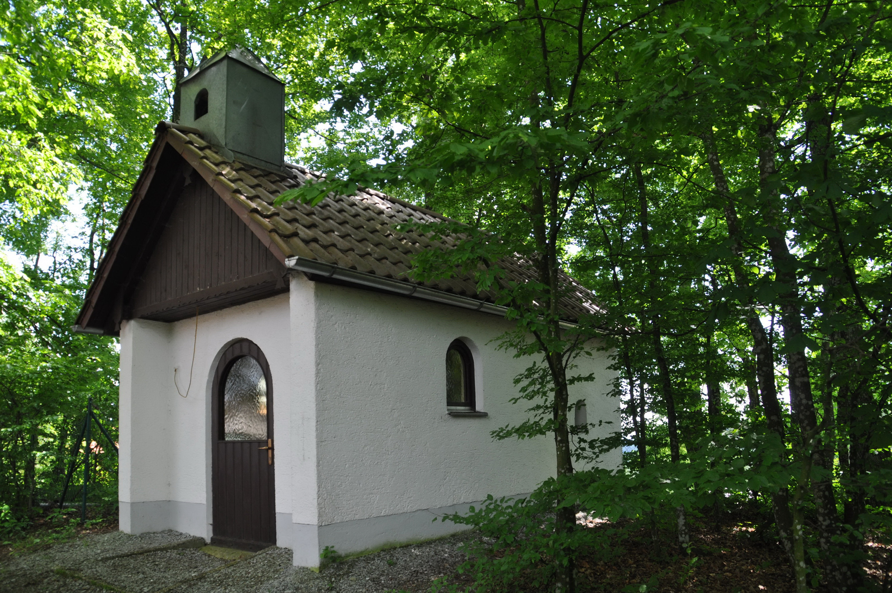 Schaufling, Nemering 102 1/5. Kapelle. Satteldachbau mit Dachreiter, 18./19. Jahrhundert; mit Ausstattung.